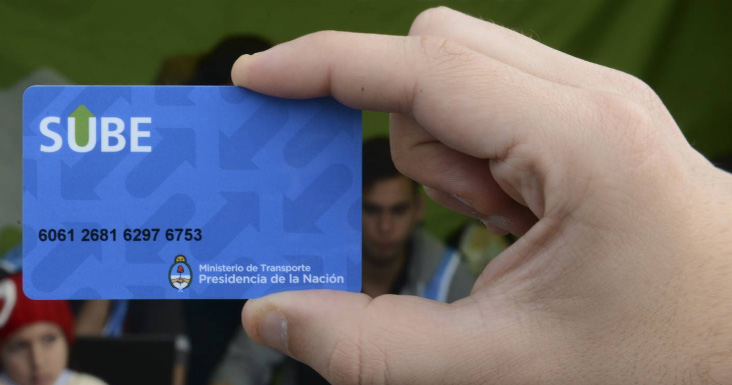 Una mano con la tarjeta Sube.